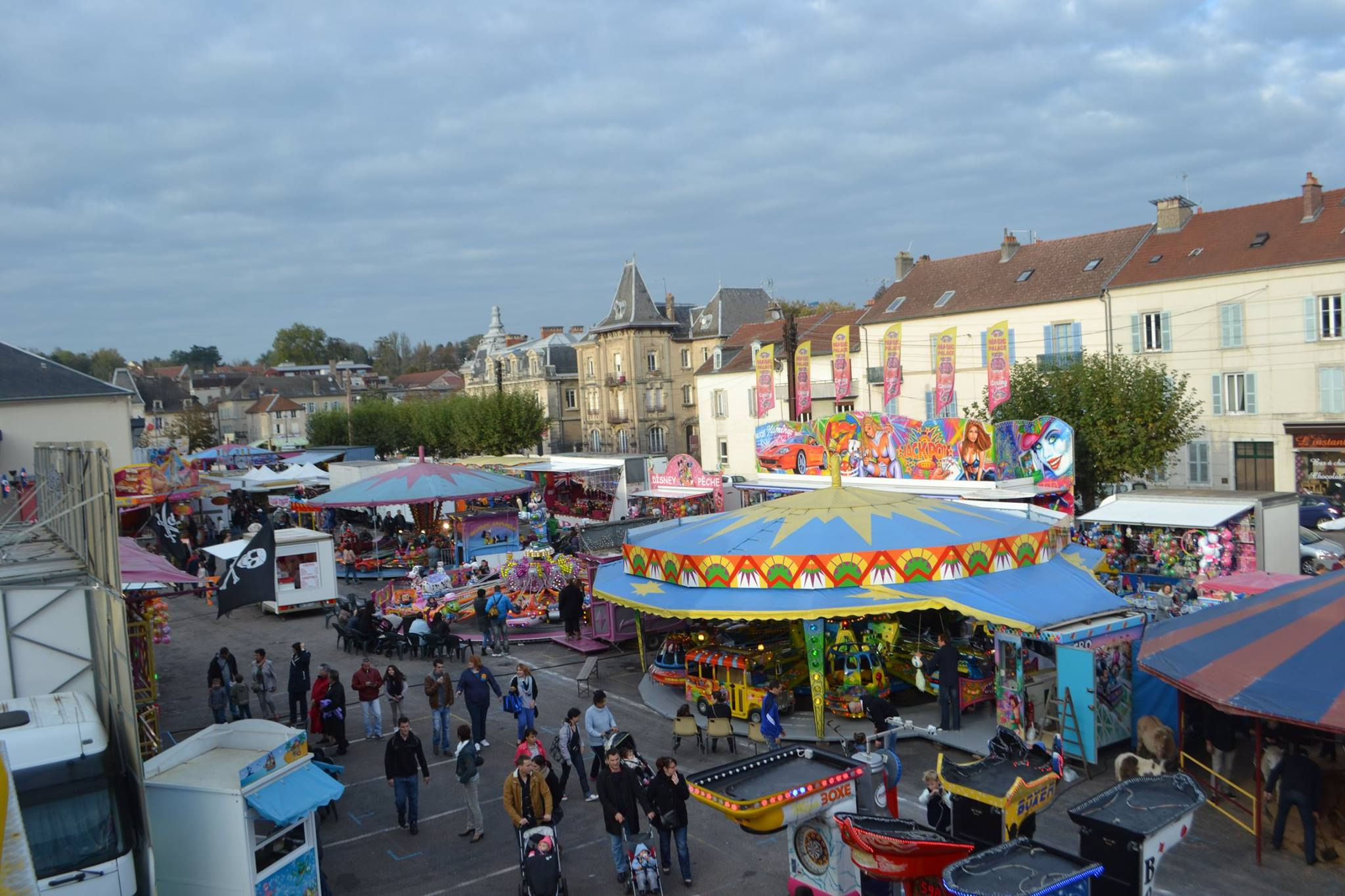 La place Pierre-Rénet de Vesoul (Haute-Saône)